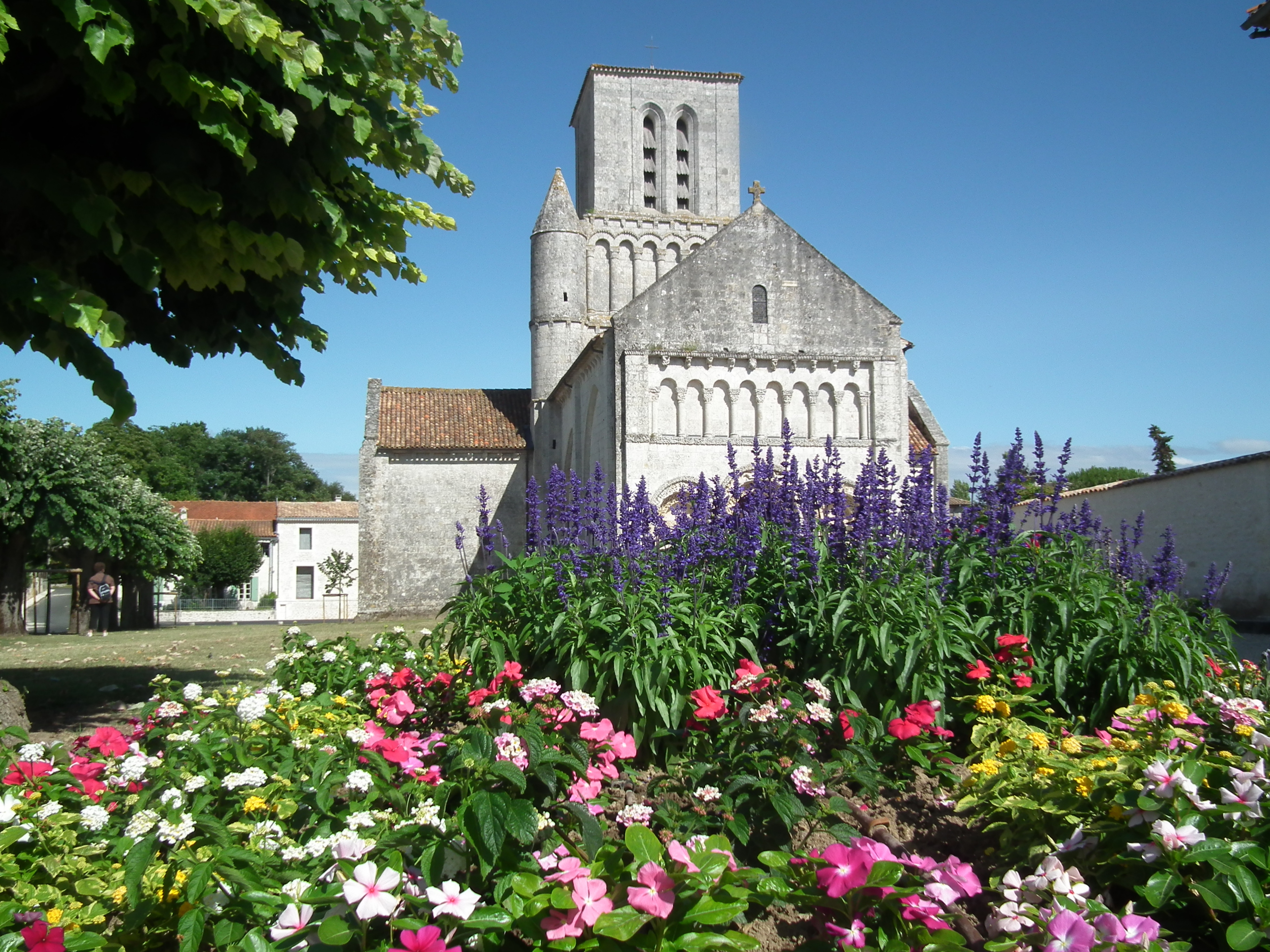 L'église romane de Corme-Ecluse